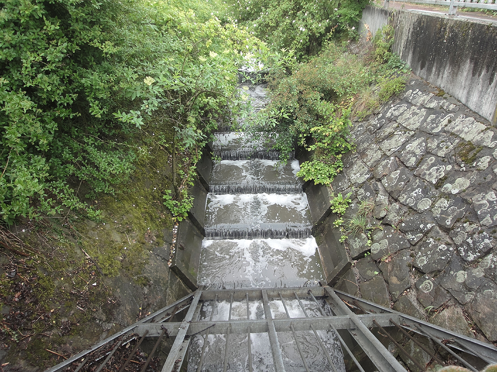 Beginn der verrohrten Strecke des Finkenbaches an der Finkenstraße in Bielefeld